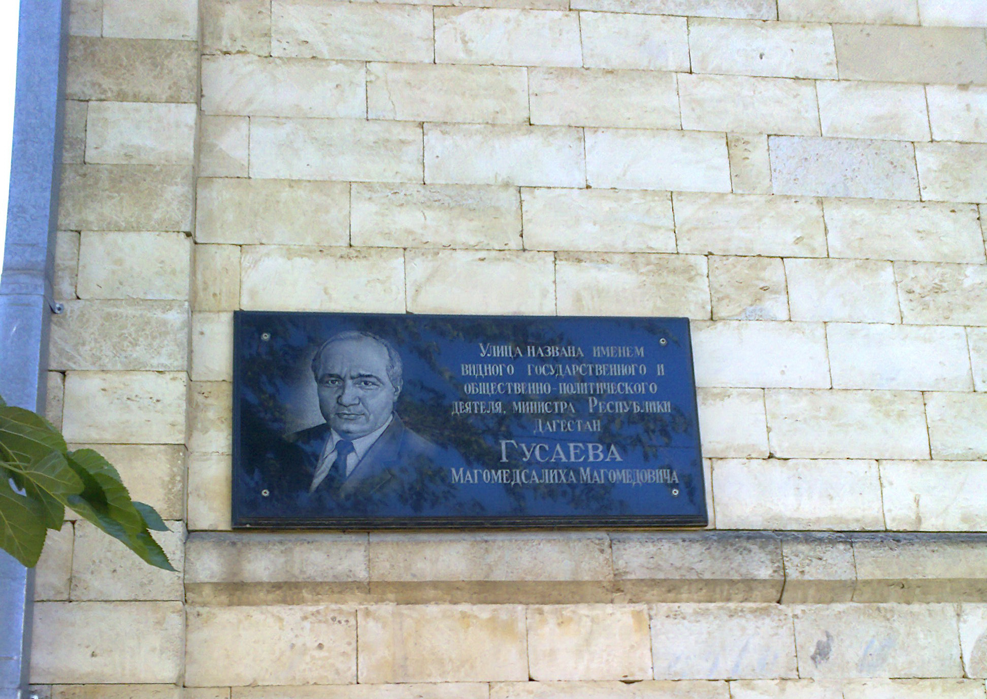 Мемориальная доска М.-С. Гусаева на одноимённой улице в Чинаре